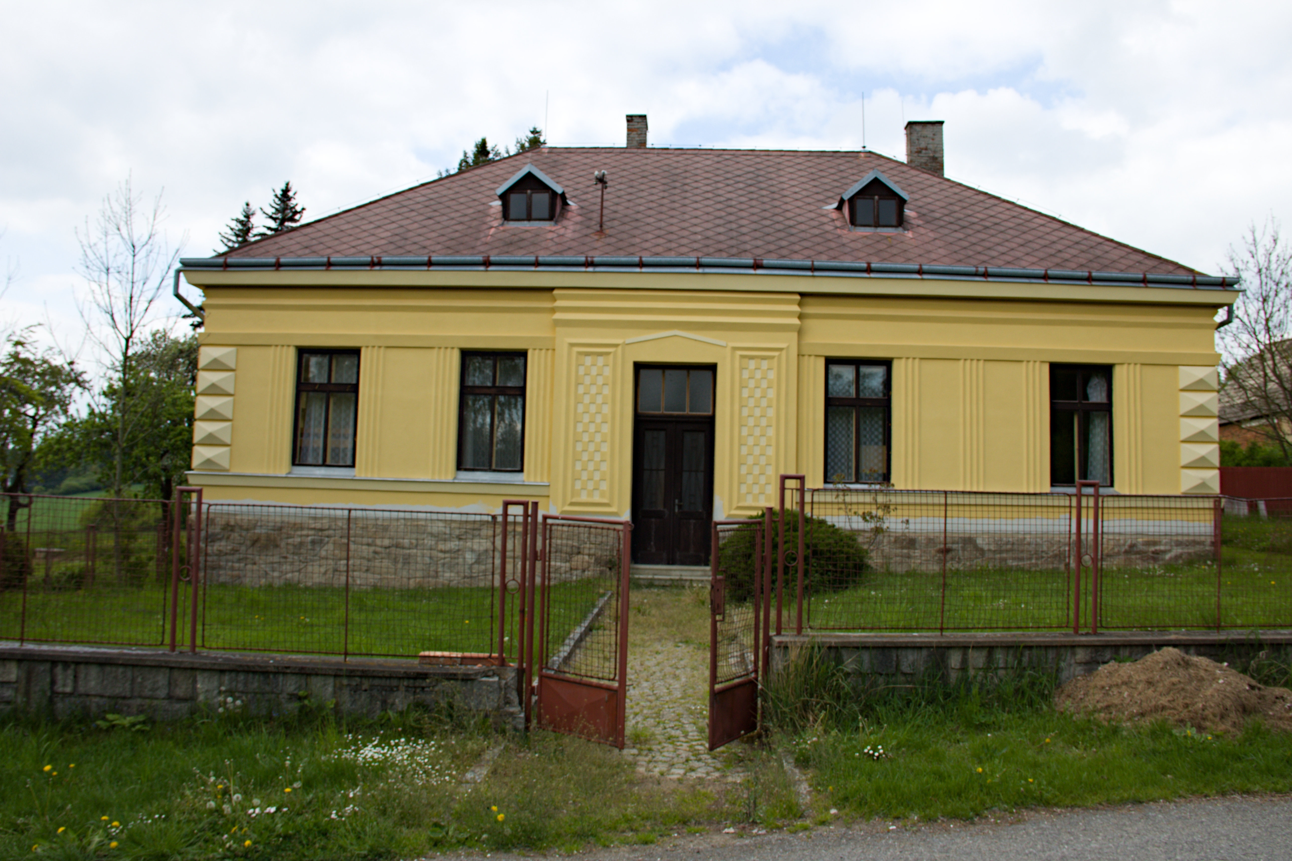 Budova školy ve Zvolenovicích z roku 1914